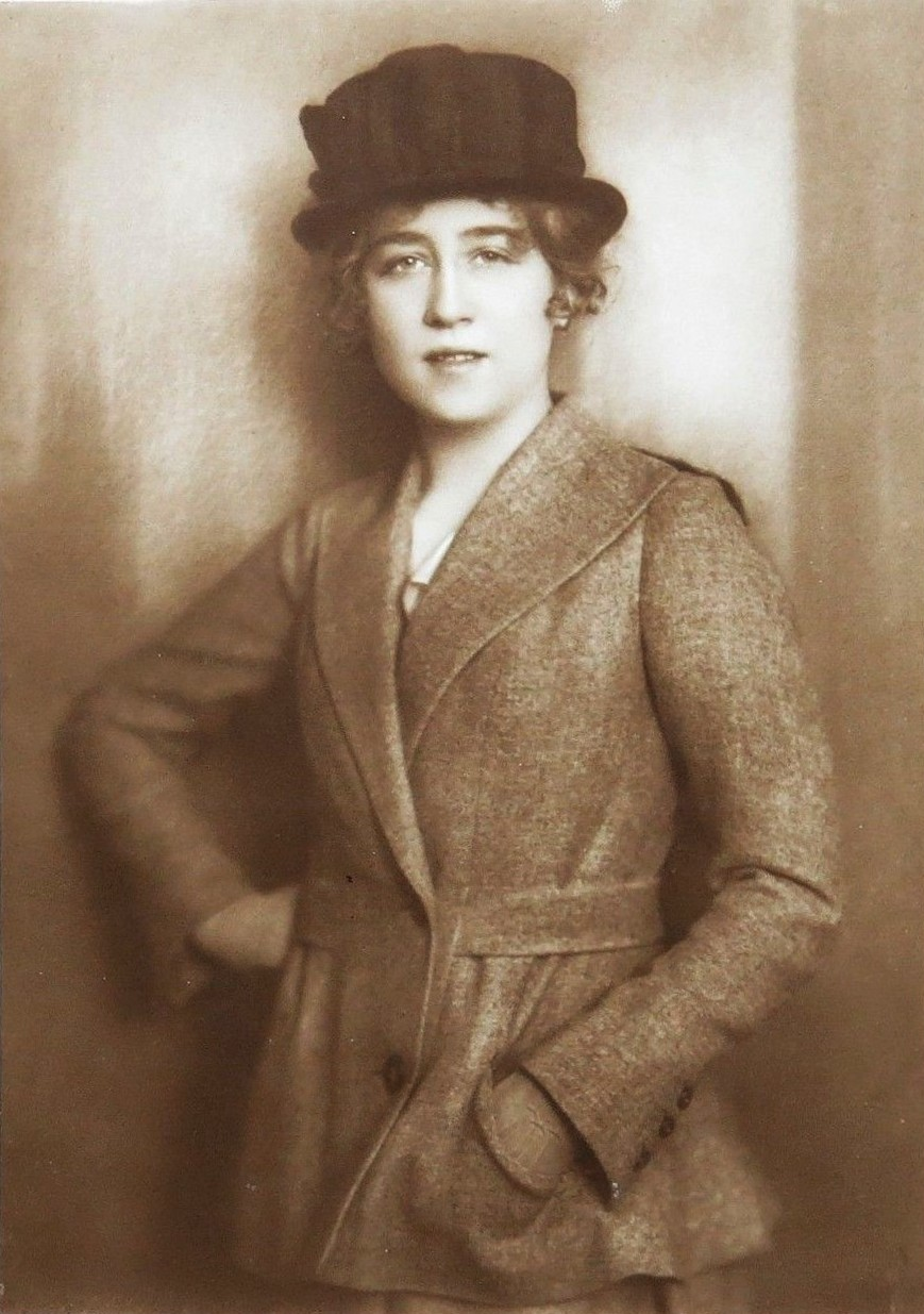 Else Eckersberg. Photopostkarte des Ateliers (Otto) Becker & (Heinrich) Maass. Film-Sterne 109/1